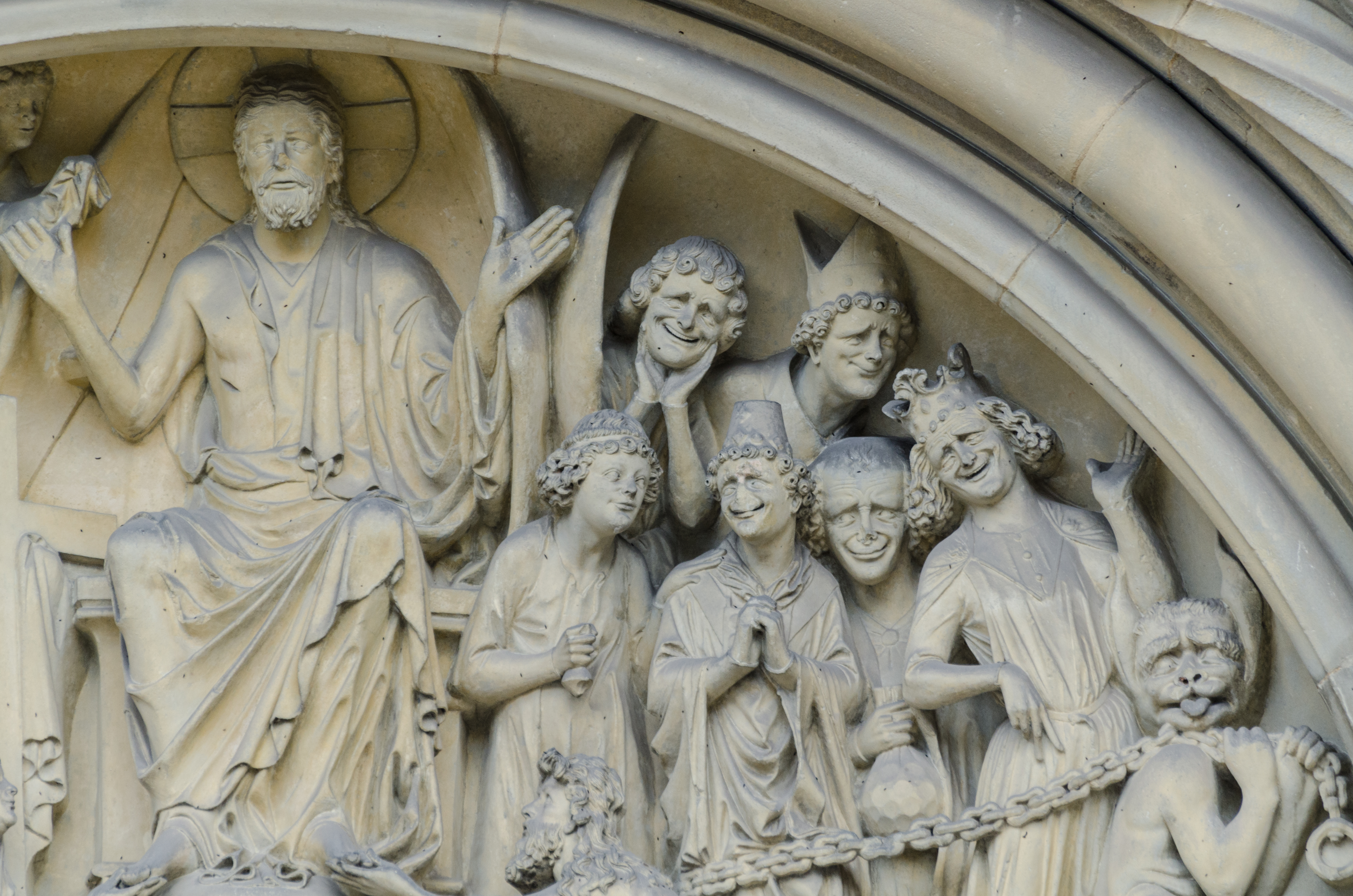 Bamberg, Dom, Fürstenportal, Tympanon